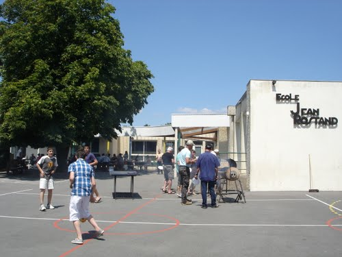 Ecole Jean Rostand (Dilliec, Saint-Nolff) à la fête du quartier. Cette photo se trouve aussi sur Panoramio.